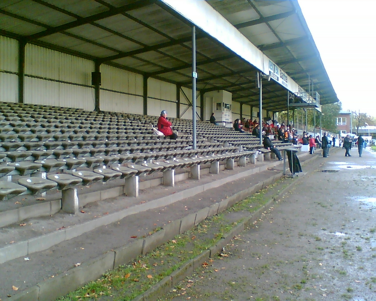 Adolf-Jäger-Kampfbahn Haupttribüne - Fotografiert beim Spiel gegen Oberneuland in Hamburg, Deutschland